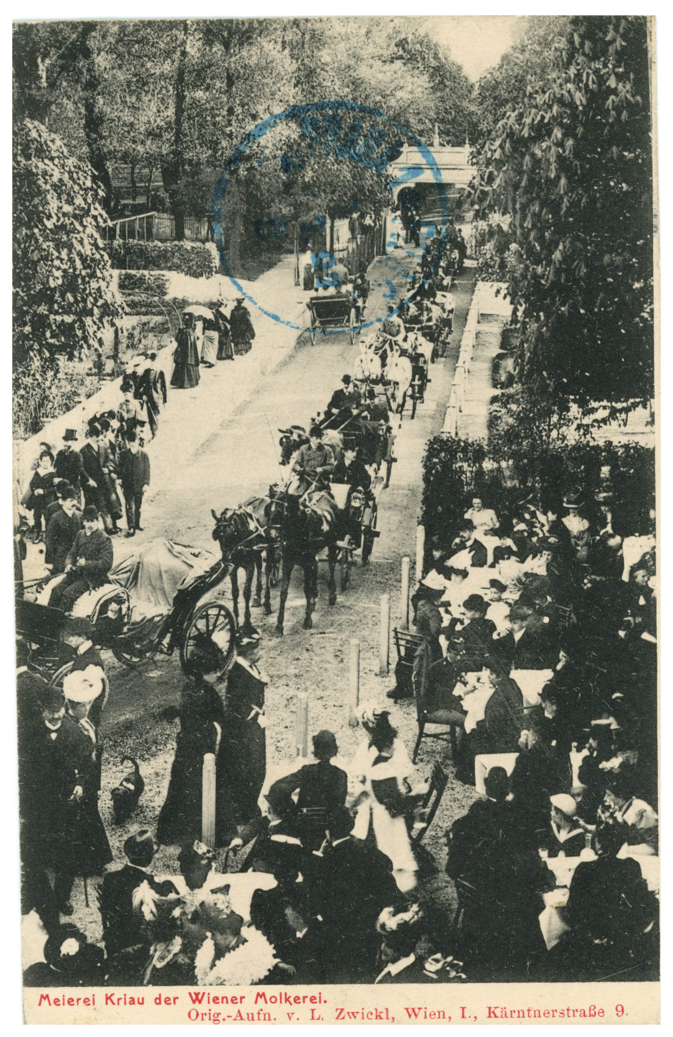 Eingang zur ehemaligen Meierei Krieau im k. u k. Prater Wien